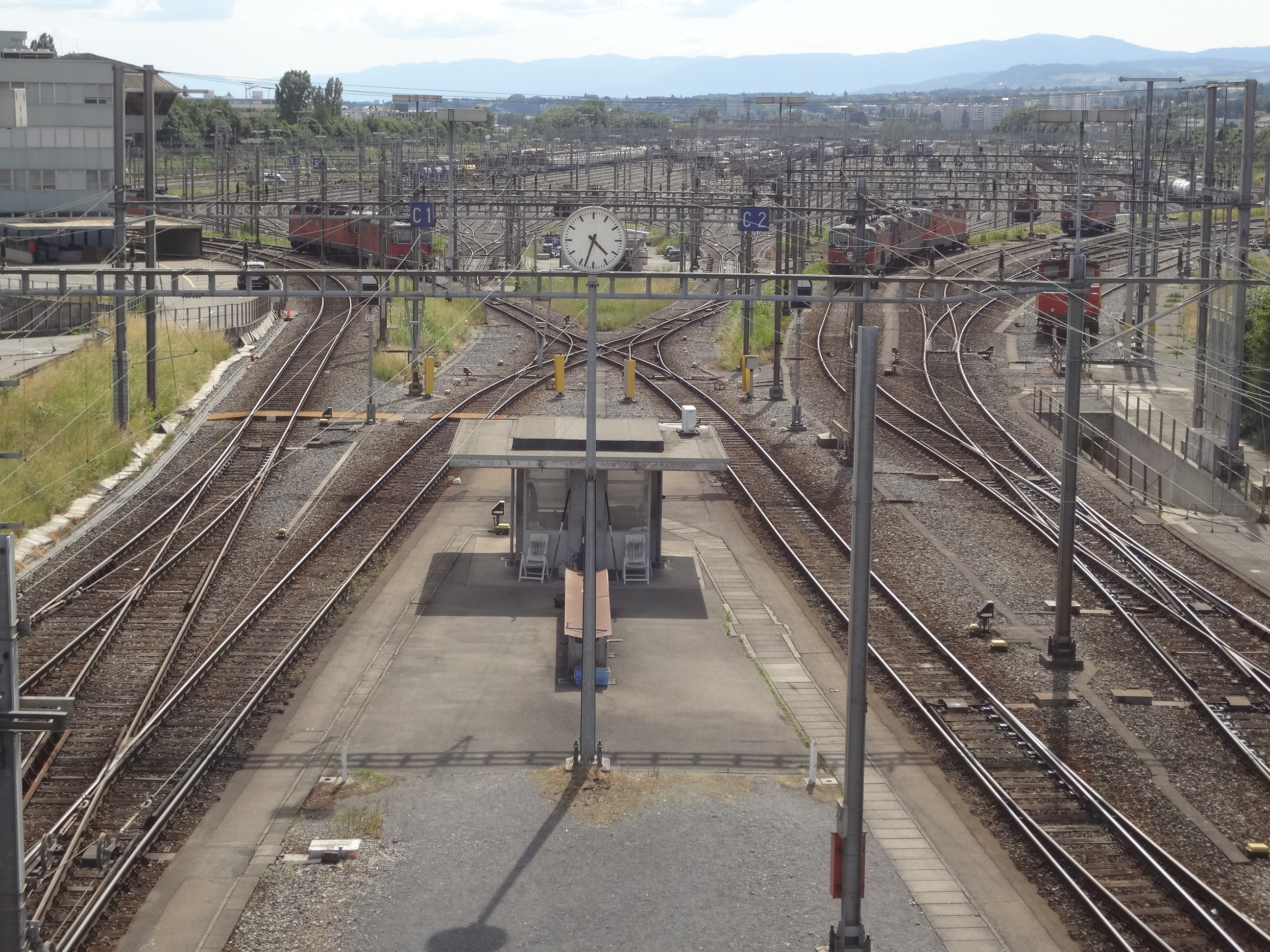 Gare de Lausanne-Triage à Denges : bosse de débranchement vue depuis le pont reliant Denges à Échandens, en direction de Genève.